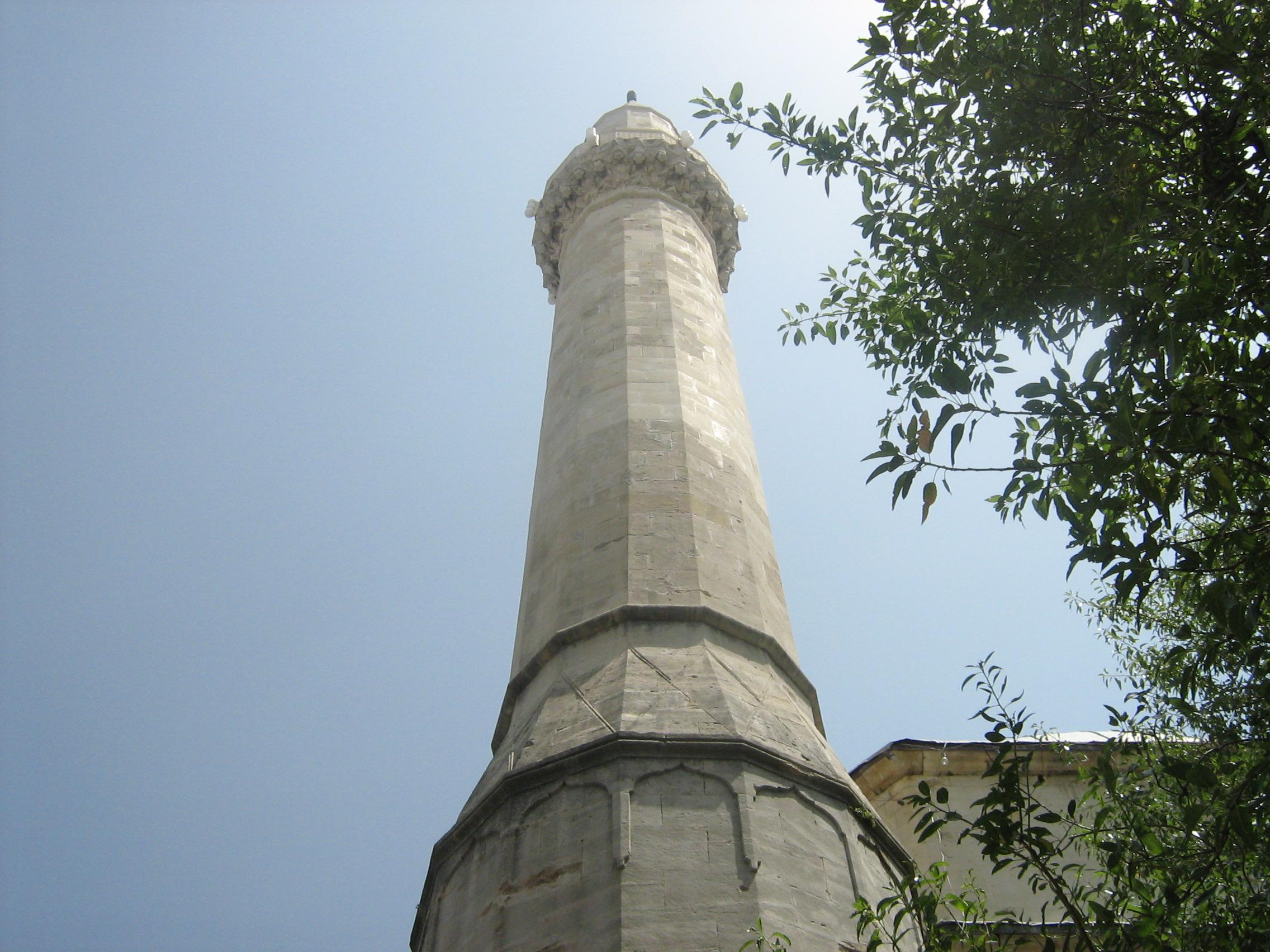 Tallest minaret in Herzegowina